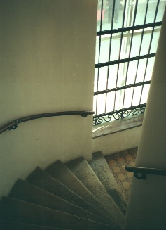 Evang._reformierte_Stadtkirche